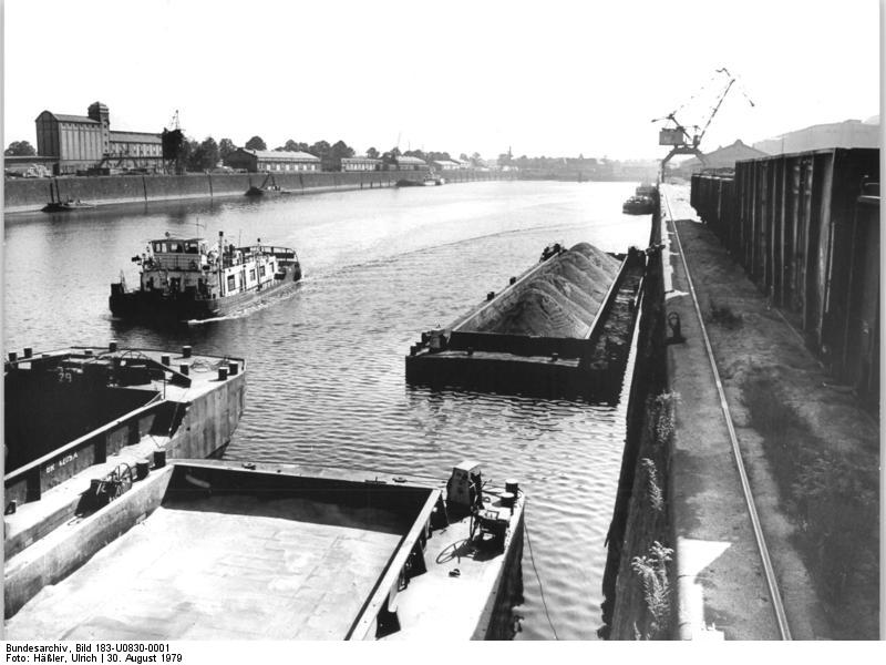 Dresden, Binnenhafen, Lastkähne ADN-ZB Häßler 30.8.1979 Dresden: Baustoffe, Erze und Betonfertigteile werden vor allem hier im VEB Binnenhäfen Oberelbe in Dresden umgeschlagen. Durchschnittlich 3500 Tonnen Güter werden von den Hafenarbeitern täglich bewegt. Einen großen Anteil an der Bewältigung der Transportaufgaben haben auch die Kollegen der Hafenbahn. Täglich rangieren sie 100 Güterwagen und sorgen für ein schnelles Be- und Entladen der Waggons.